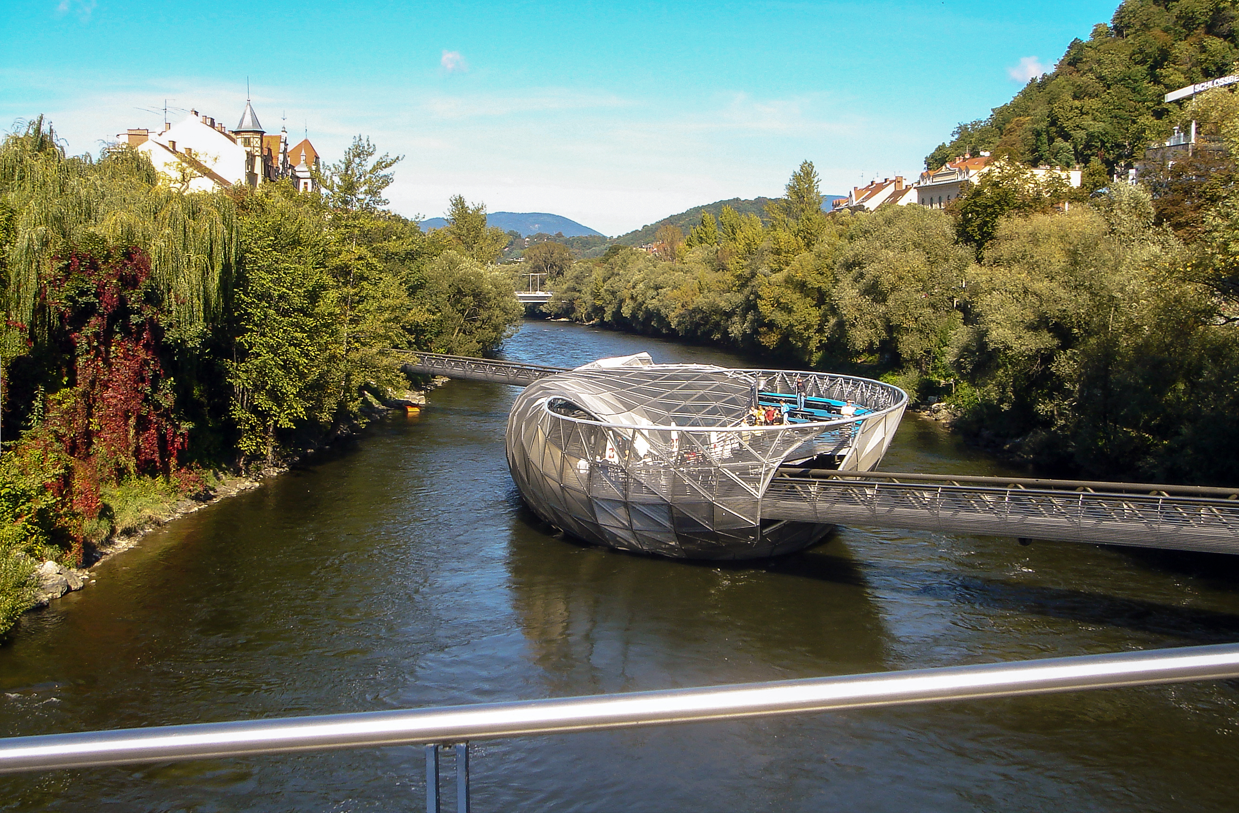 Graz, „Die Insel in der Mur“ („Grazer Murinsel“), gesehen vom Edegger-Steg.